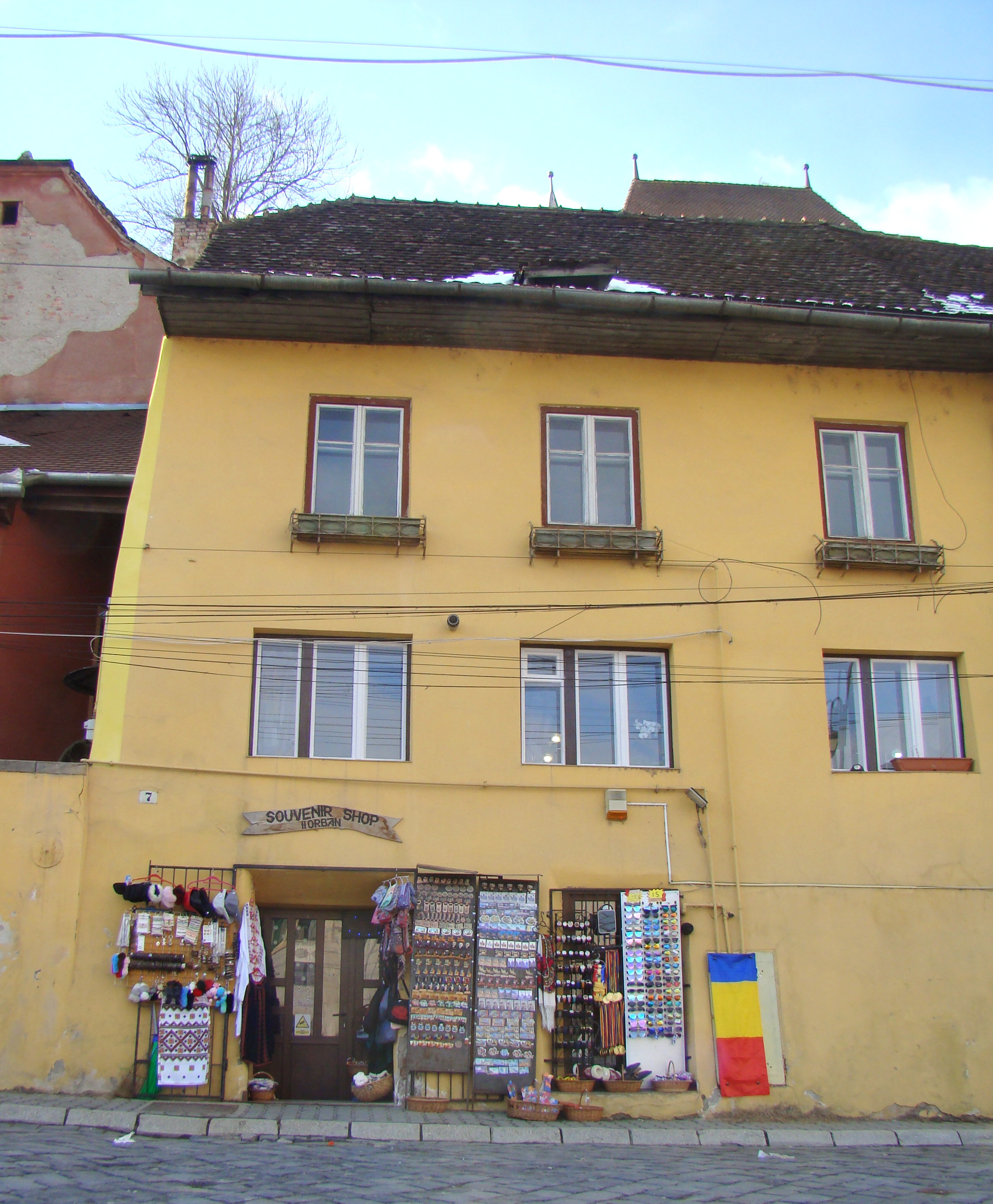 Casă, municipiul Sighișoara, Piața Goga Octavian 7 sec. XVI, sec. XVIII, sec. XIX - XX